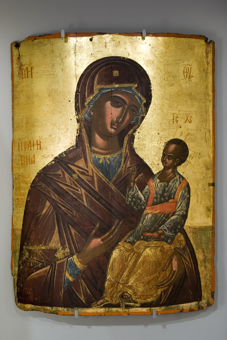 Παναγία Οδηγήτρια Β' μισό 16ου αι. Βέροια, Ιερός ναός Αγίου Βλασίου